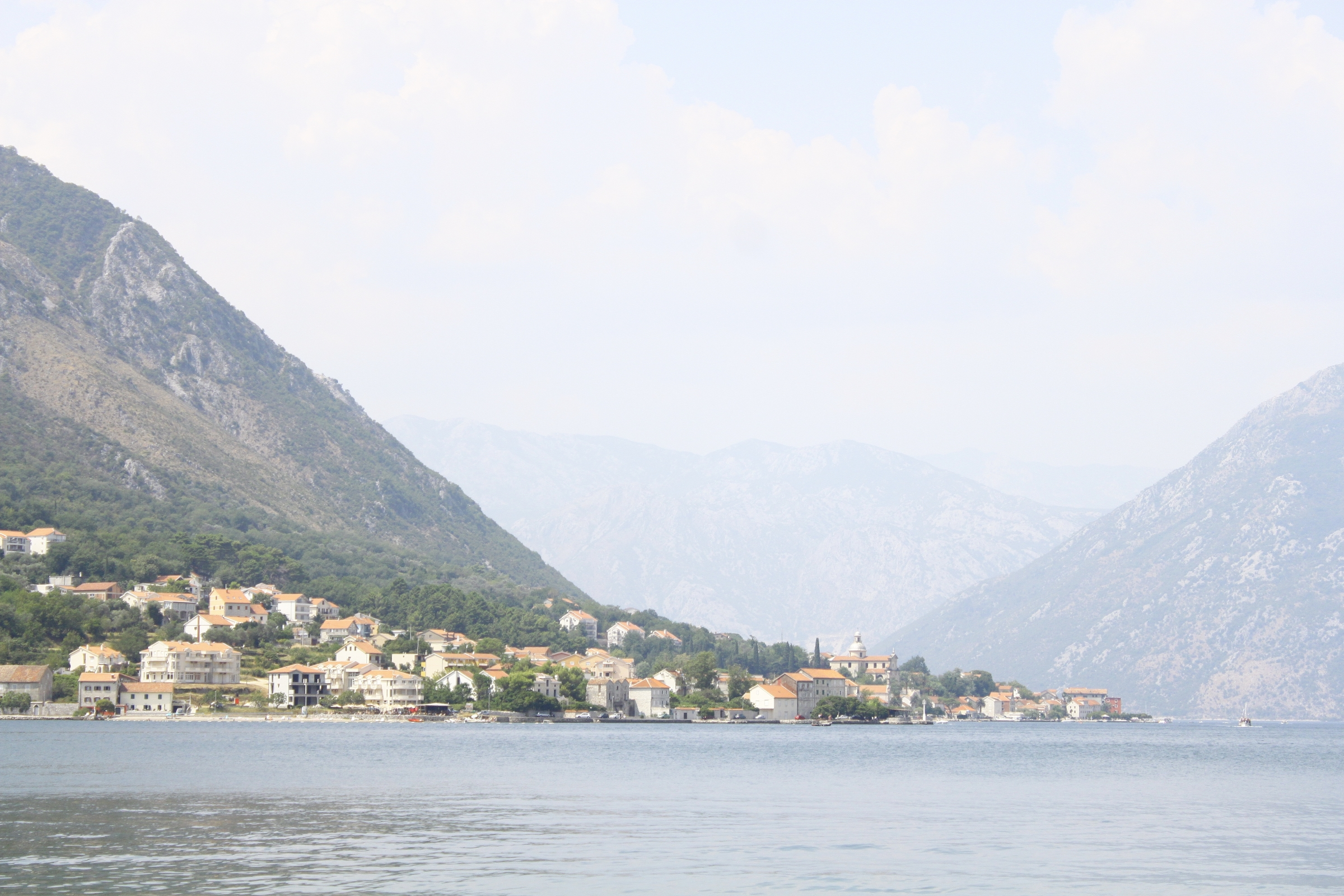 Dobrota, Montenegro